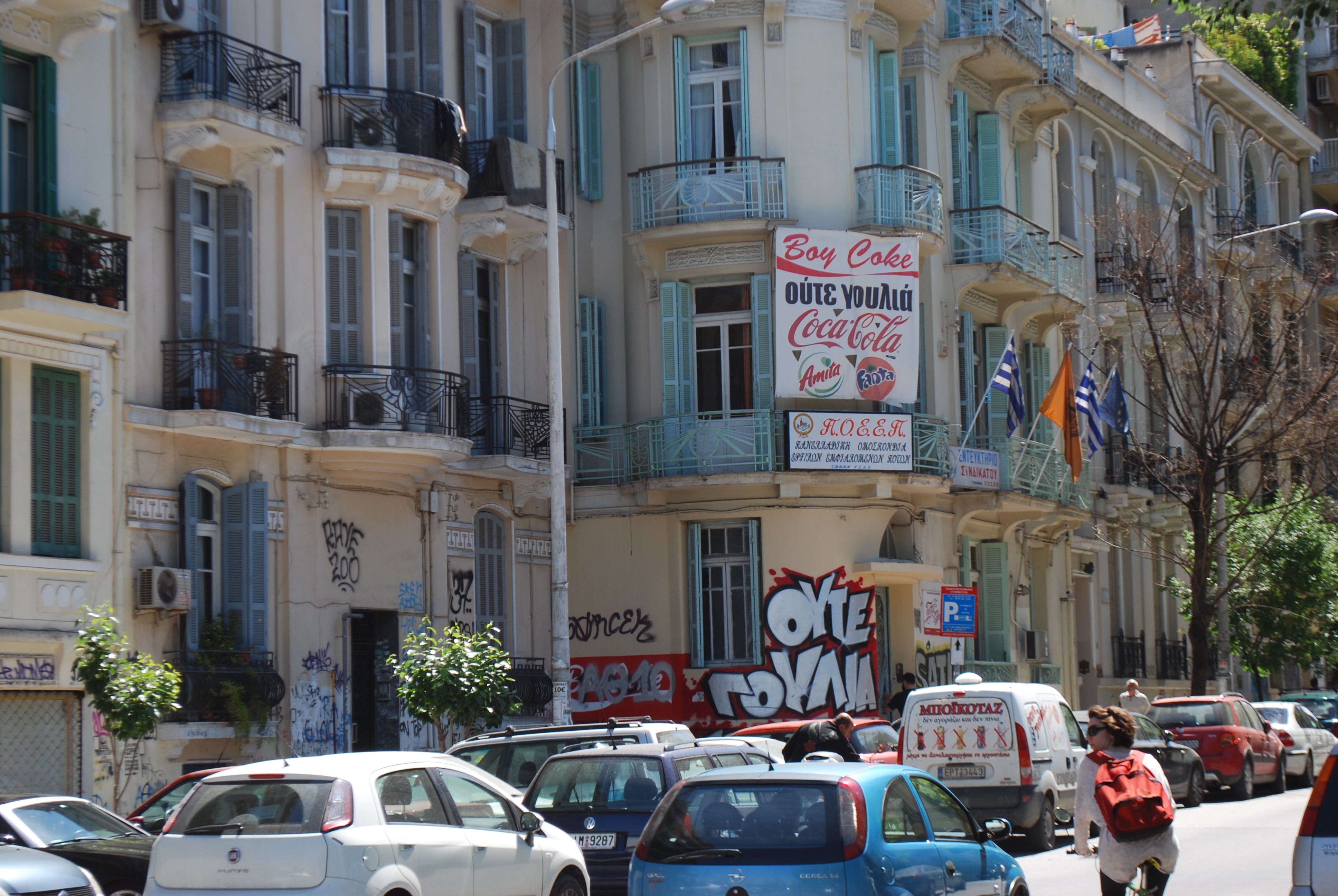 Vue de Thessalonique.